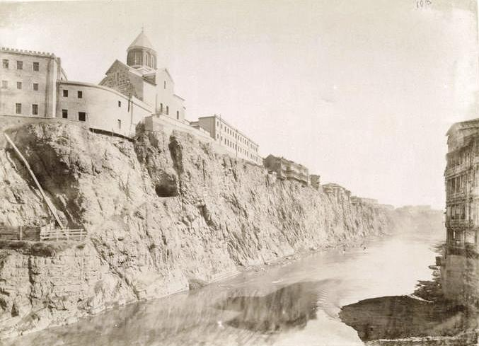 Tiflis: Metekhskii castle and River Kura